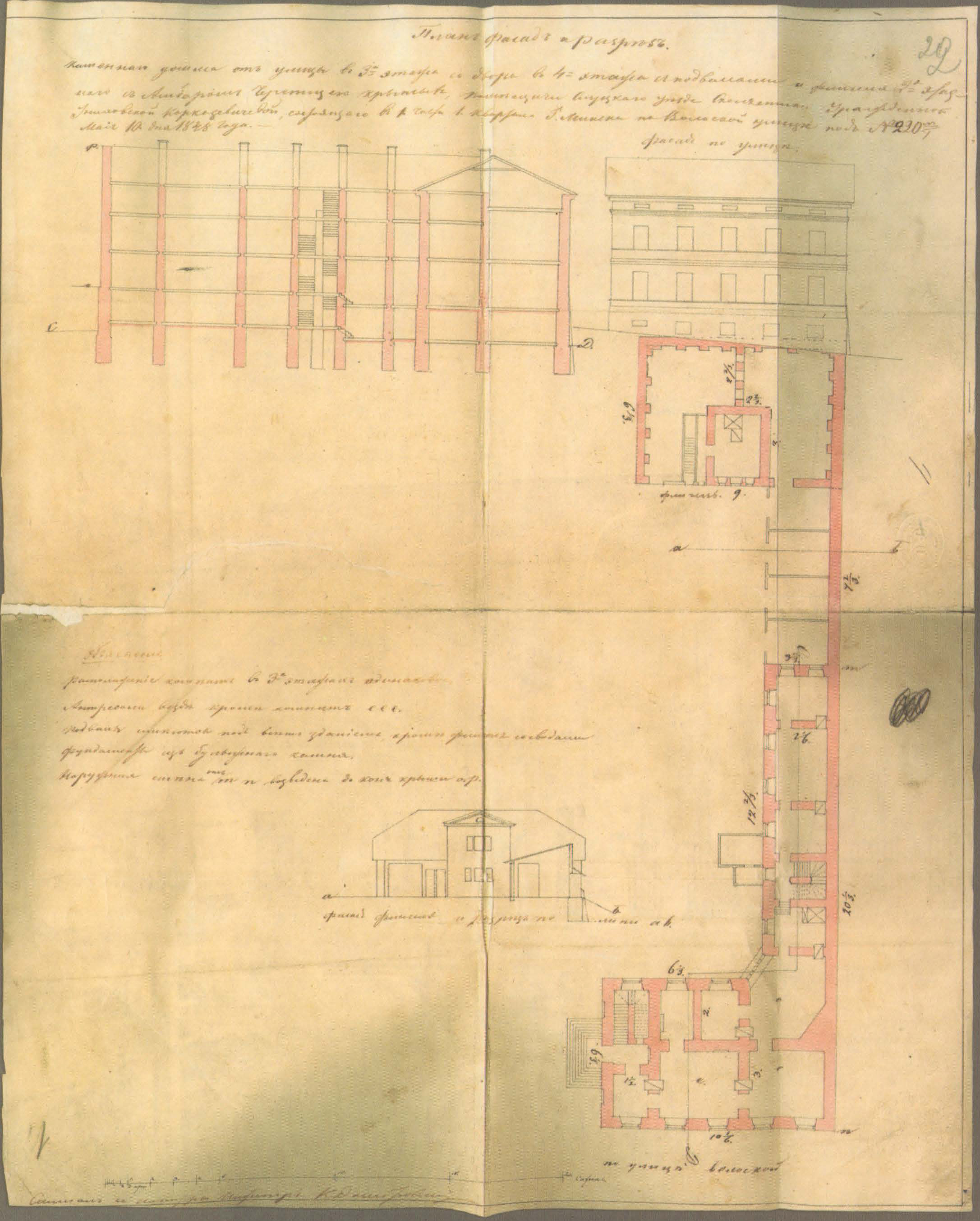 Беларуская (тарашкевіца): Менск (Miensk), вуліца Валоцкая (vulica Vałockaja). Камяніца Каркузевічаў (Karkuzievič)